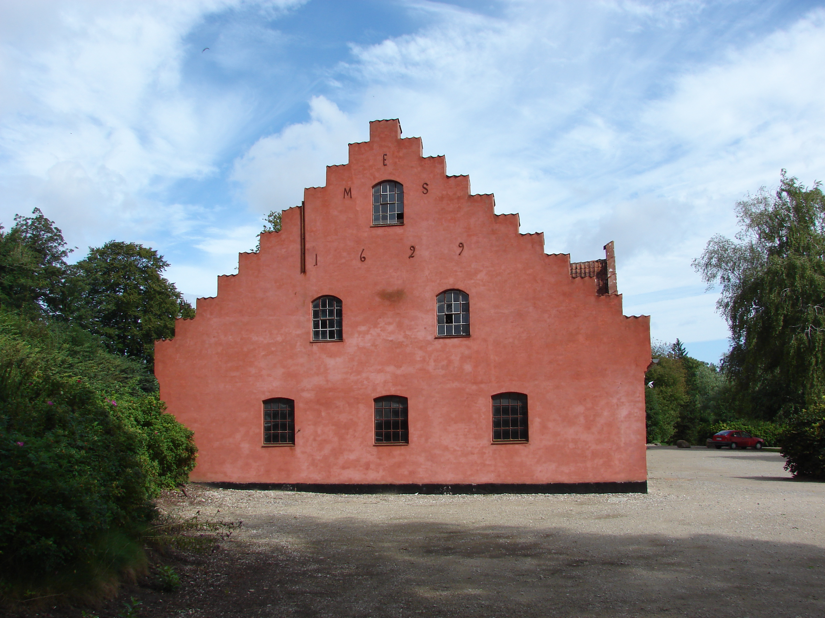 Ved Holckenhavn Slot, Fyn